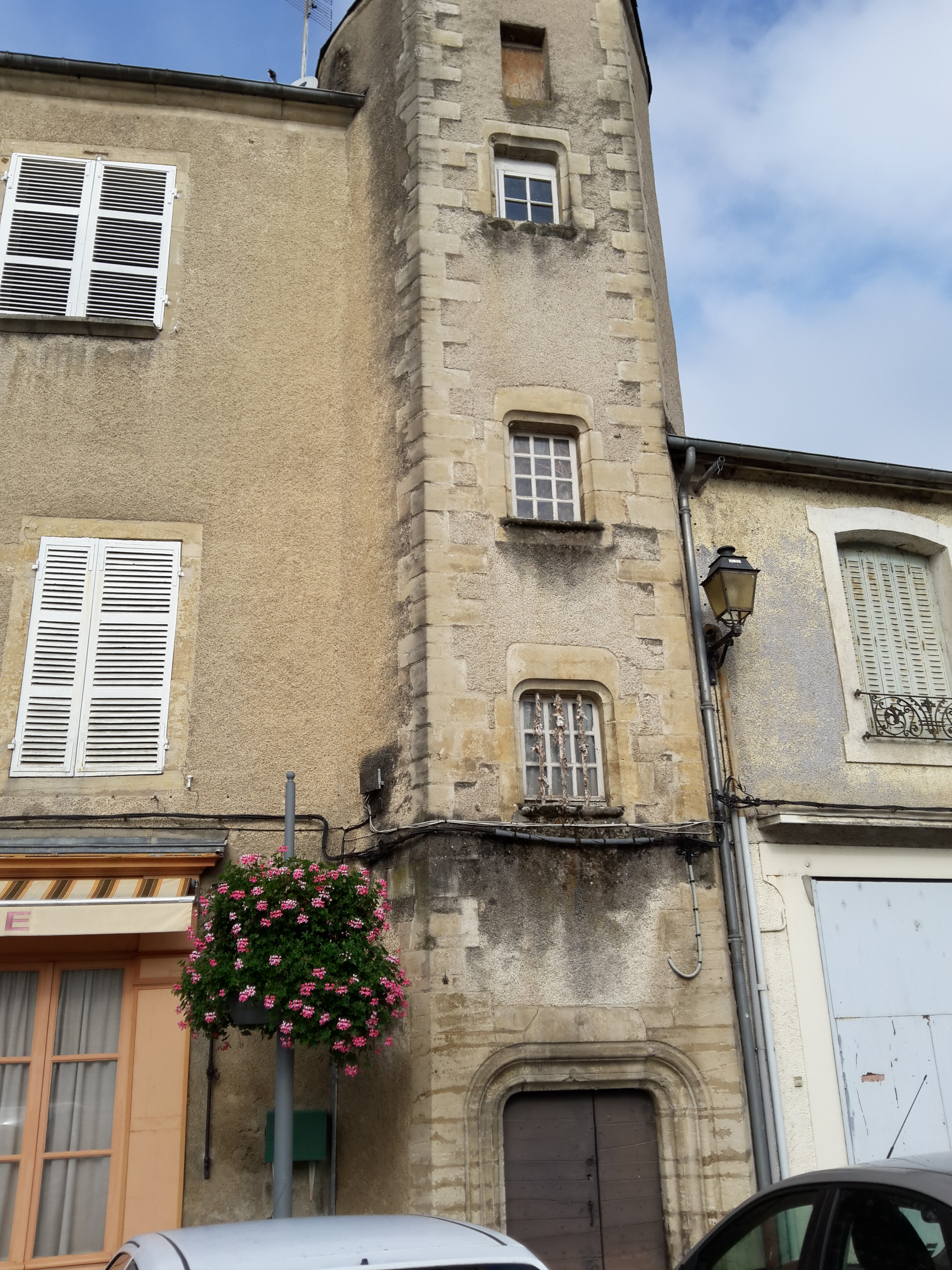 Façade du grenier à sel de Moulins-Engilbert, Nièvre, France. Édifice du XVeme sioècle